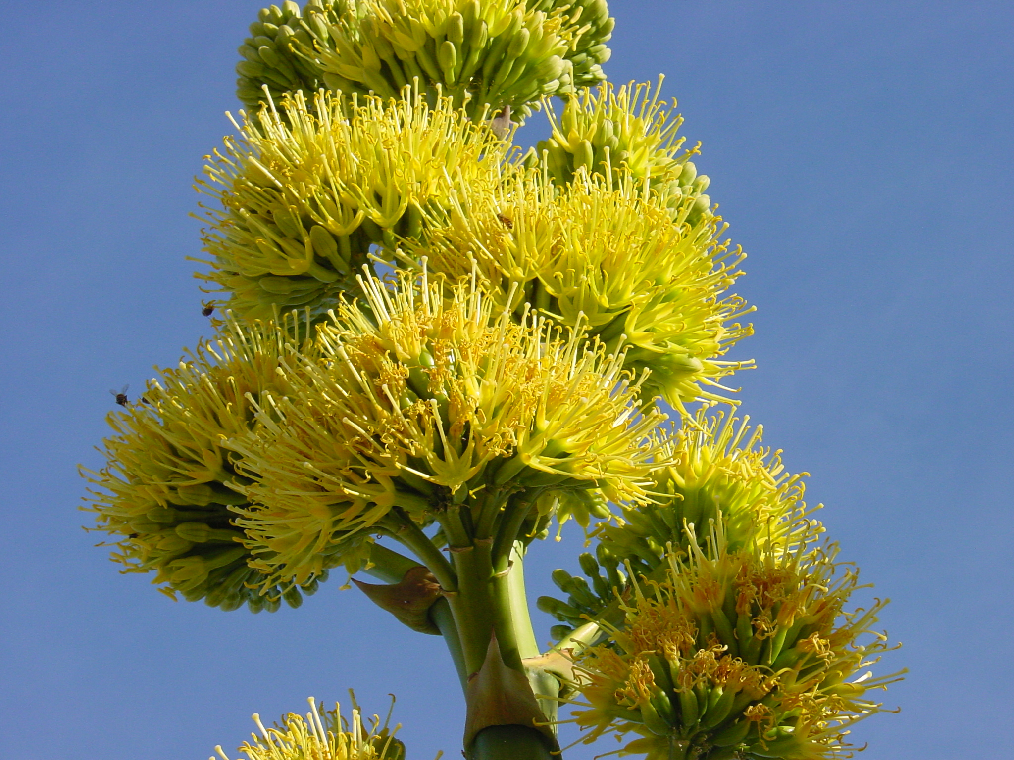 Inflorescencia de Agave deserti Author: Noah Elhardt Subject: Agave deserti Location: Anza Borrego State Park